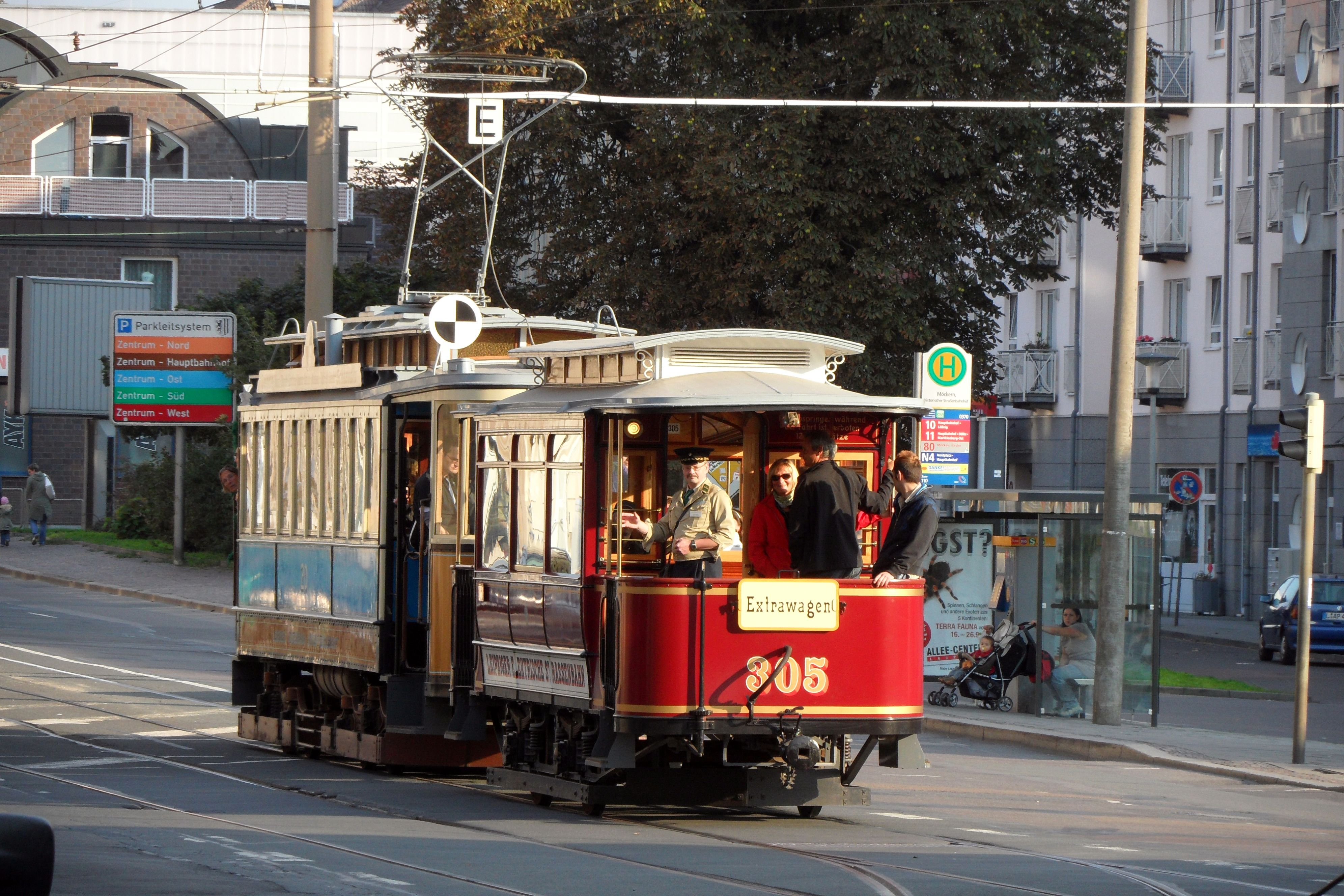 Beiwagen des Typs 55I der Leipziger Elektrischen Straßenbahn, gekuppelt mit dem Maximumtriebwagen 20 der Leipziger Außenbahn beim Schieben in das Museumsgelände. Derartige Zugbildungen waren erst nach der technischen Anpassung der Fahrzeuge nach der Vereinigung von GLSt und LESt 1917 möglich.